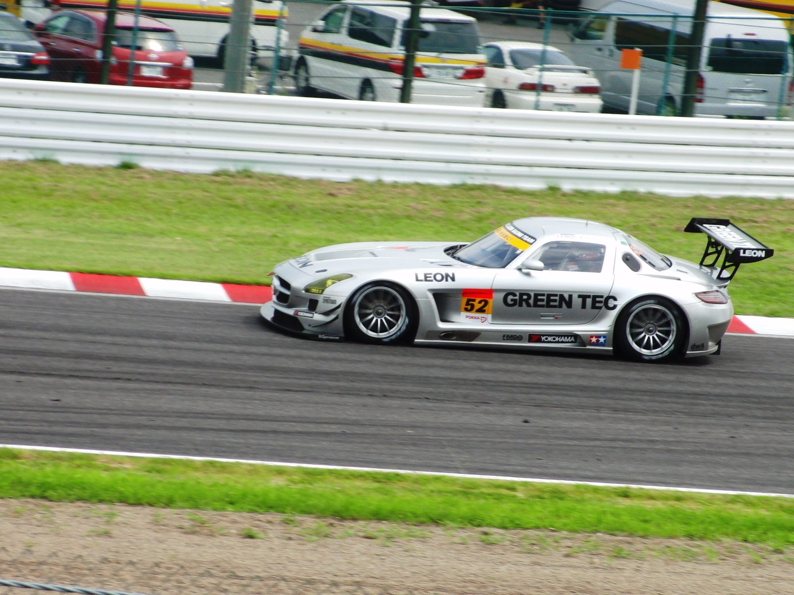 2012年度ポッカ1000kmにおいて52号車GREEN TEC & LEON SLSを撮影。